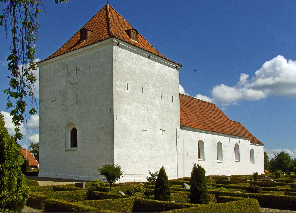 fra sydvest